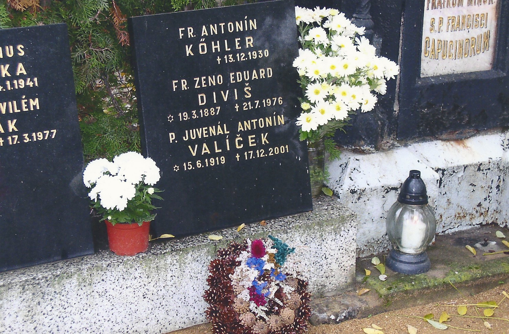 Místo odpočinku P. Juvenála Valíčka v Brně na Ústředním hřbitově